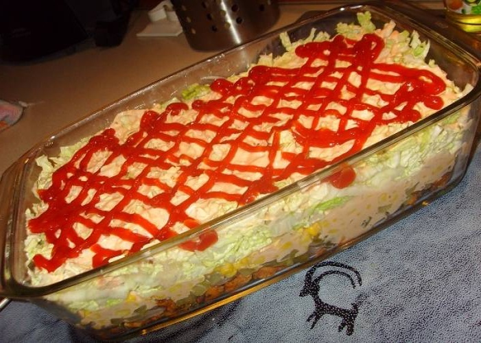 zdjęcie sałatki gyros